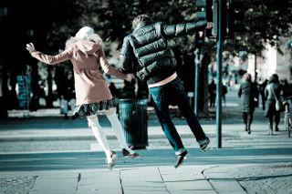 Dans